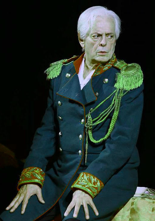 Народный артист РФ Алексей Шейнин в роли Александра Третьего в спектакле Центра МОСТ «Александр III»